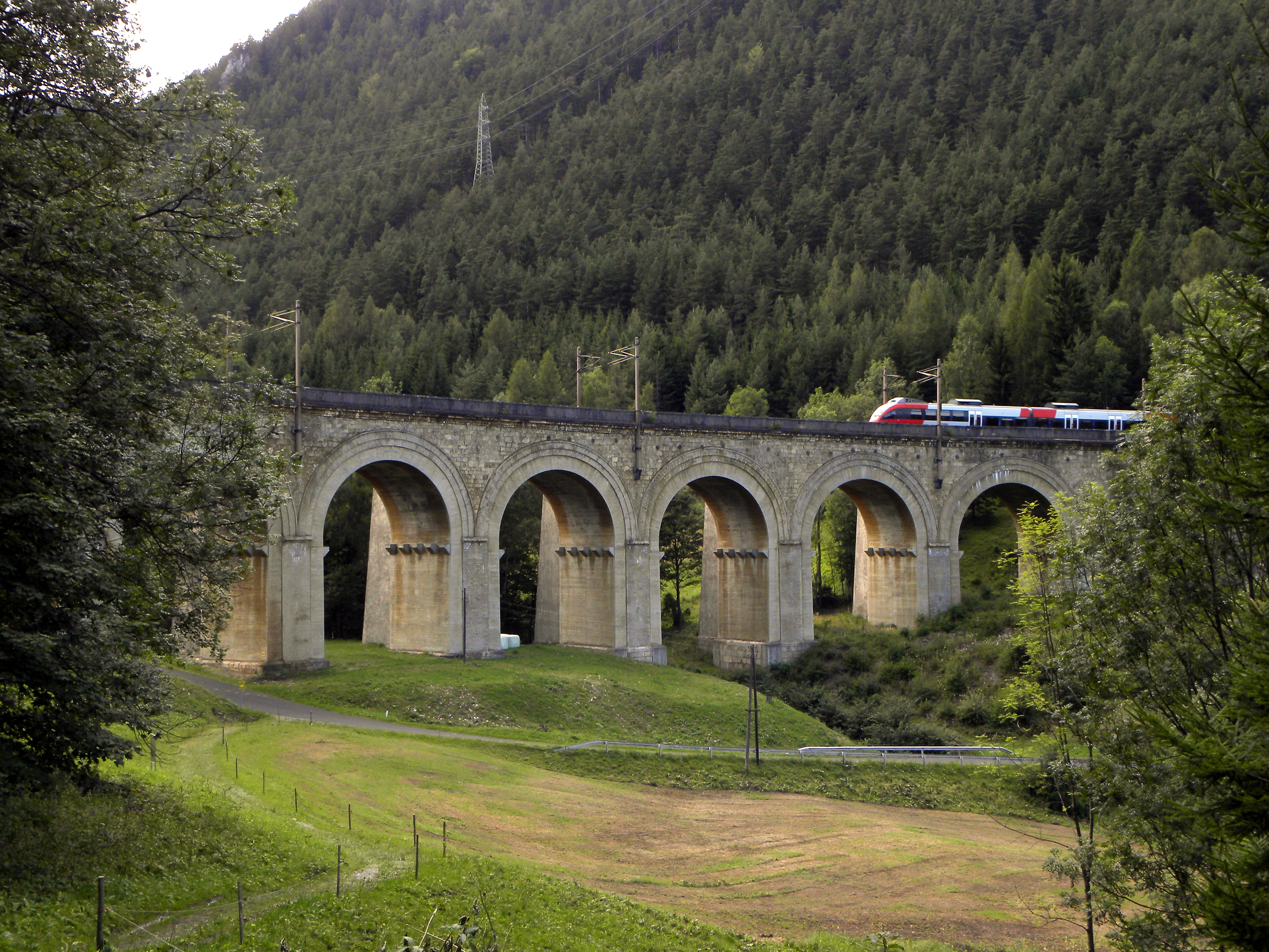 Südbahnstrecke "Semmering-Bahn" (Gloggnitz-Mürzzuschlag)